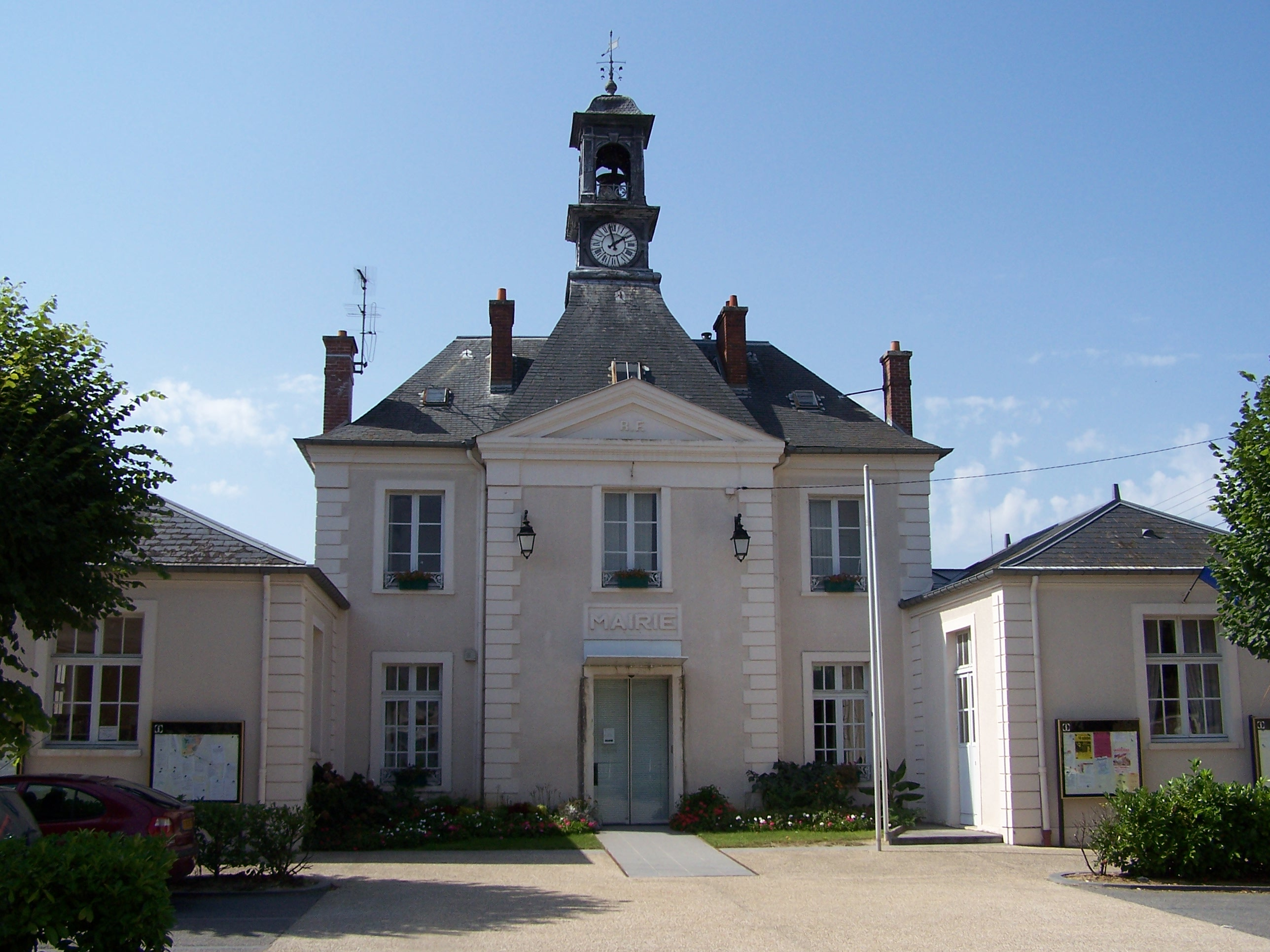 Mairie de Garancières (Yvelines, France)